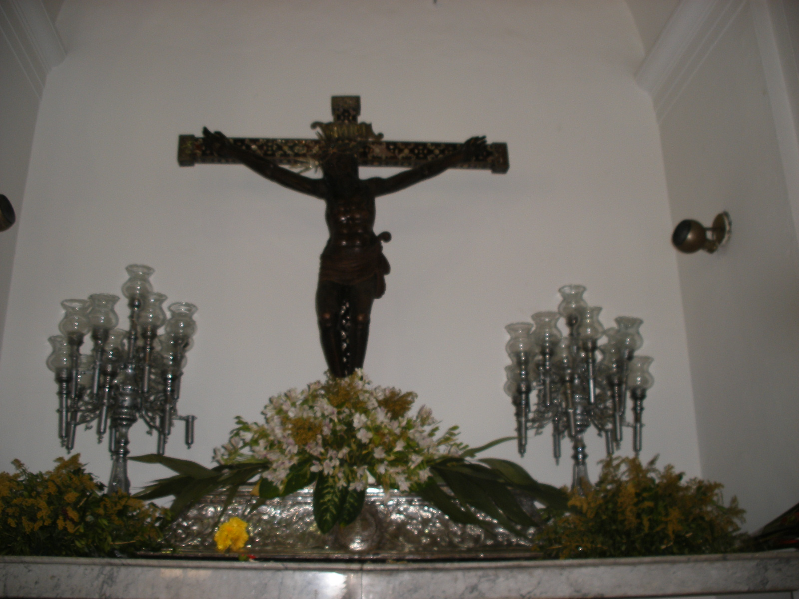 Nicho del Cristo Negro de Maracaibo, en la Catedral de dicha ciudad